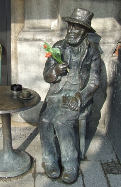 Pomink Piotra Skrzyneckiego przed kawiarnią Vis a Vis, Rynek Główny, Kraków